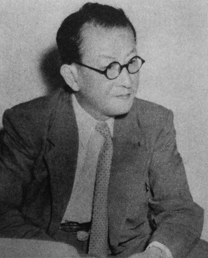 尾高朝雄